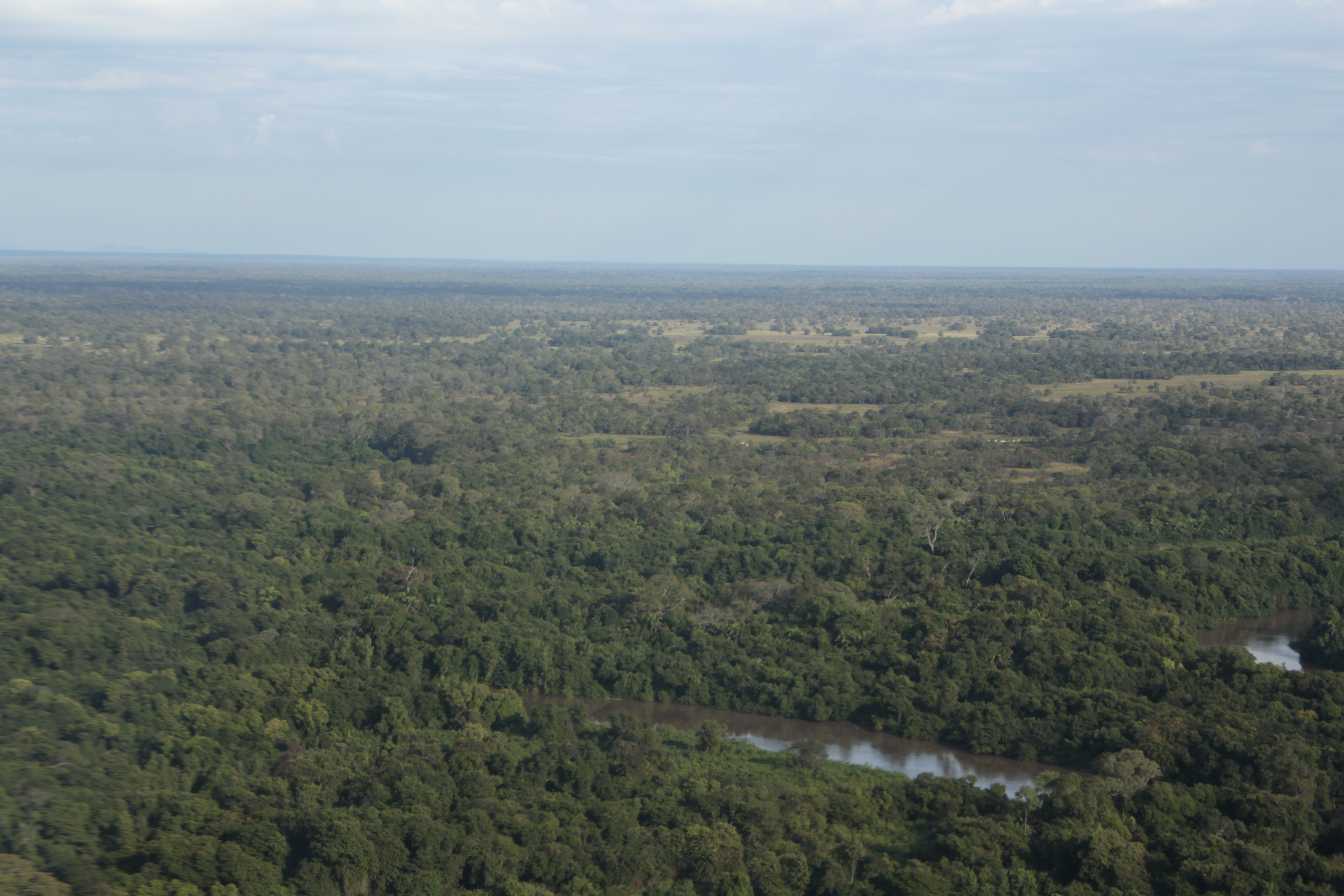 Imagem aérea do Pantanal